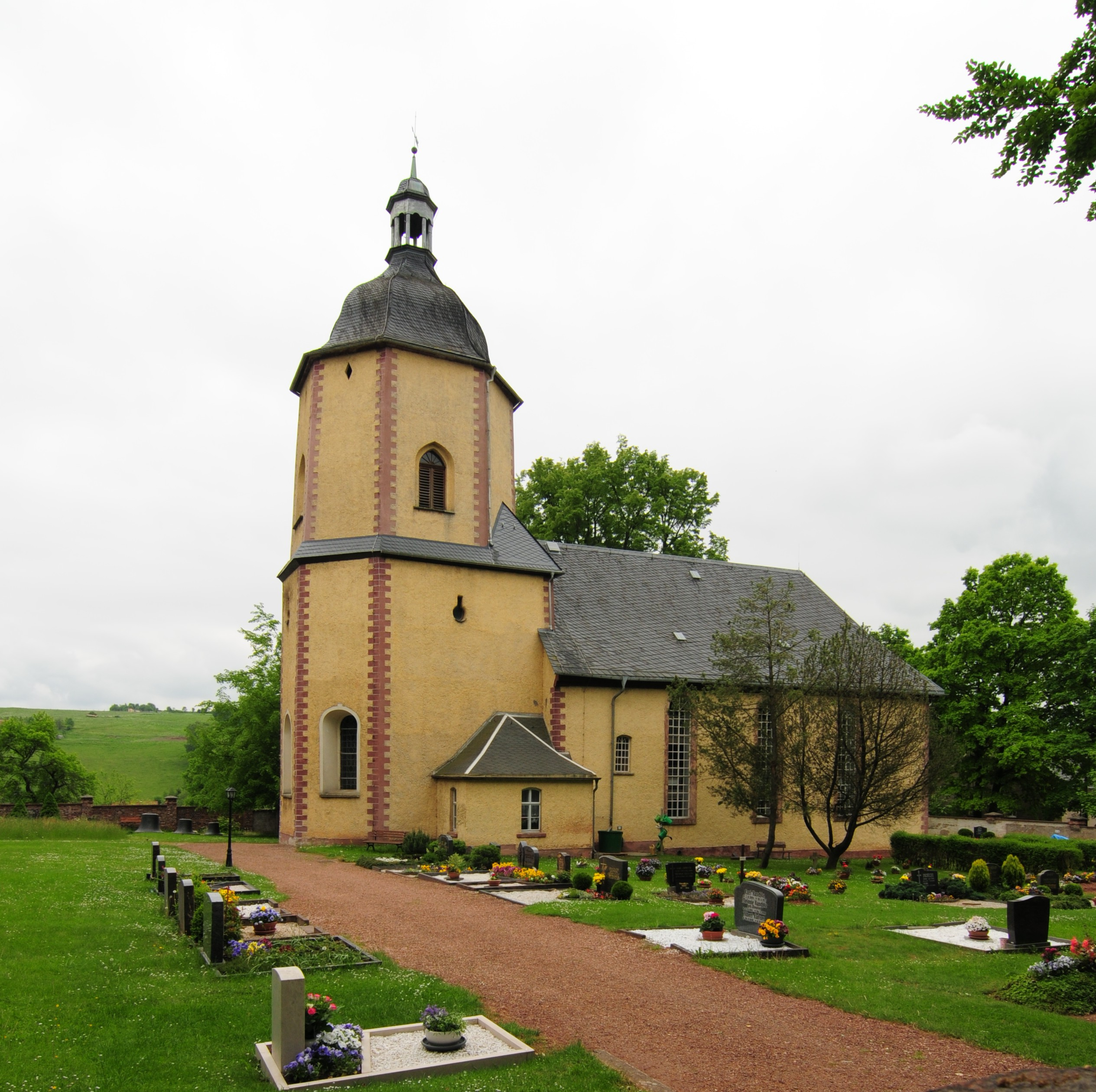 Zschocken (Hartenstein), Kirche (Sachsen, Deutschland)